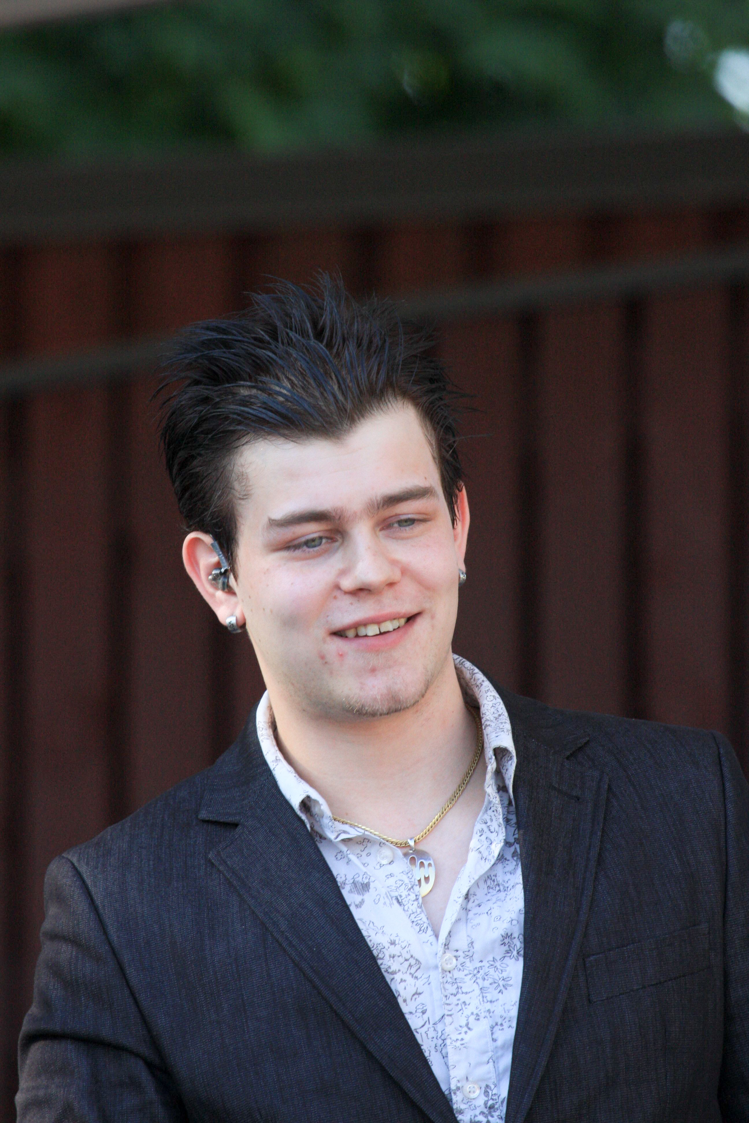 tangokuningas Henri Stenroth